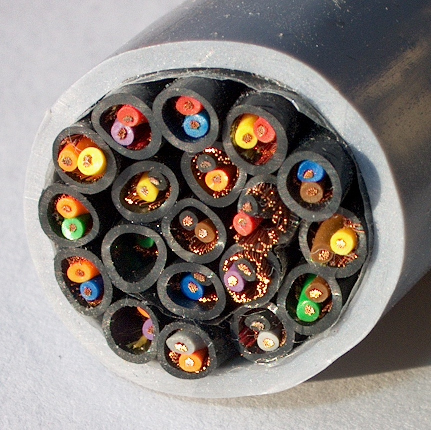 Belden multikabel, 19 shielded pairs, diameter=21mm.